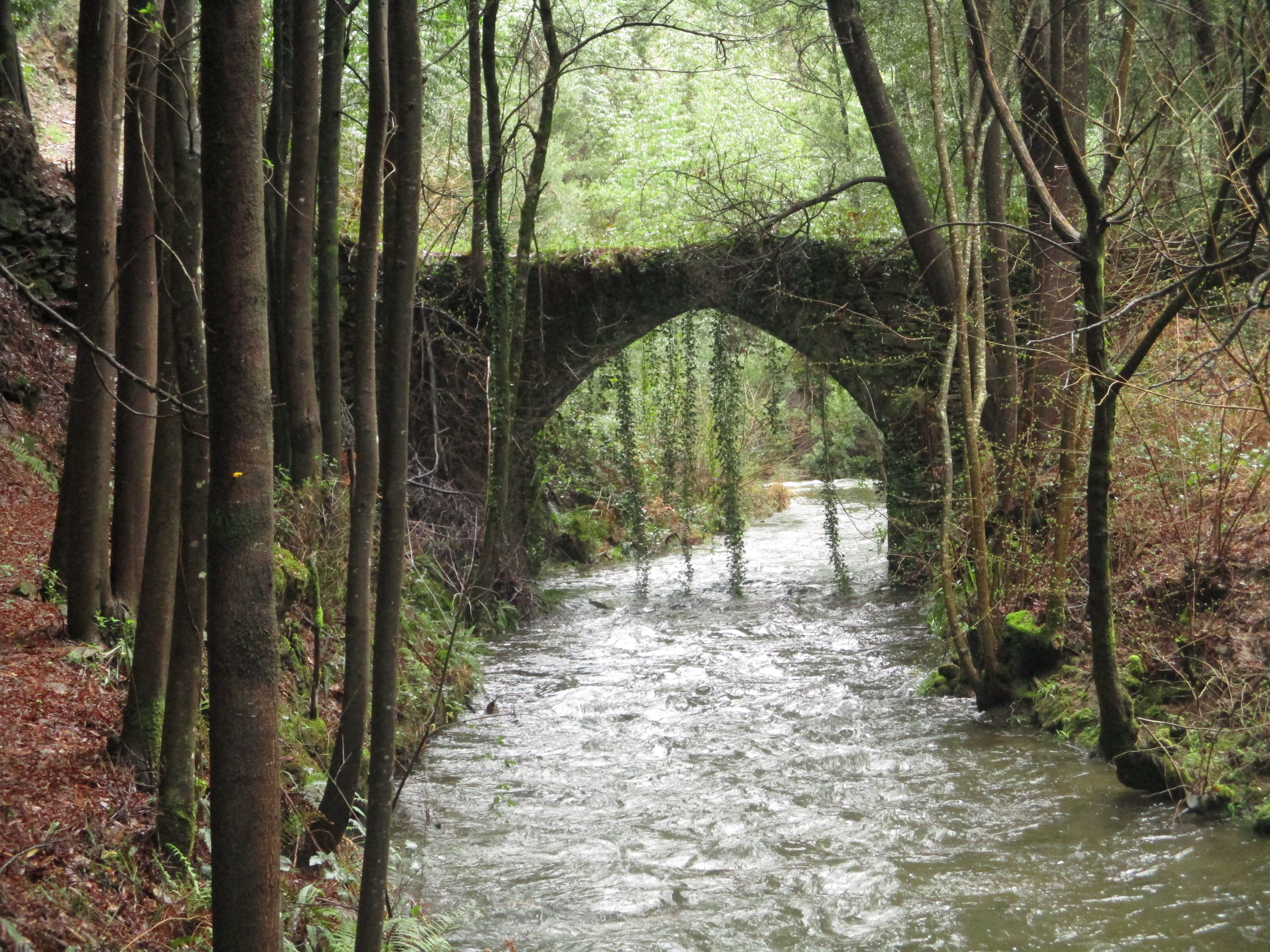 Ponte de arco quebrado sobre o rio de Telhadela